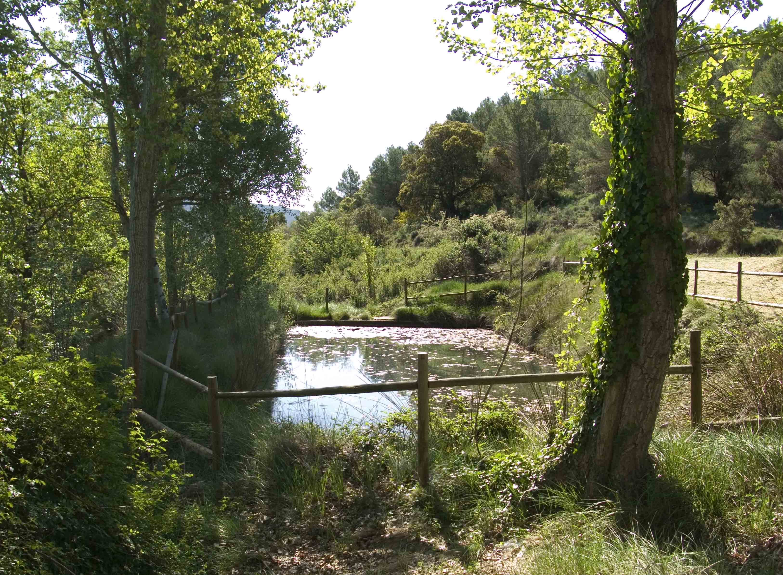 Bassa del municipi de Requena, a Villar de Olmos. (País Valencià)